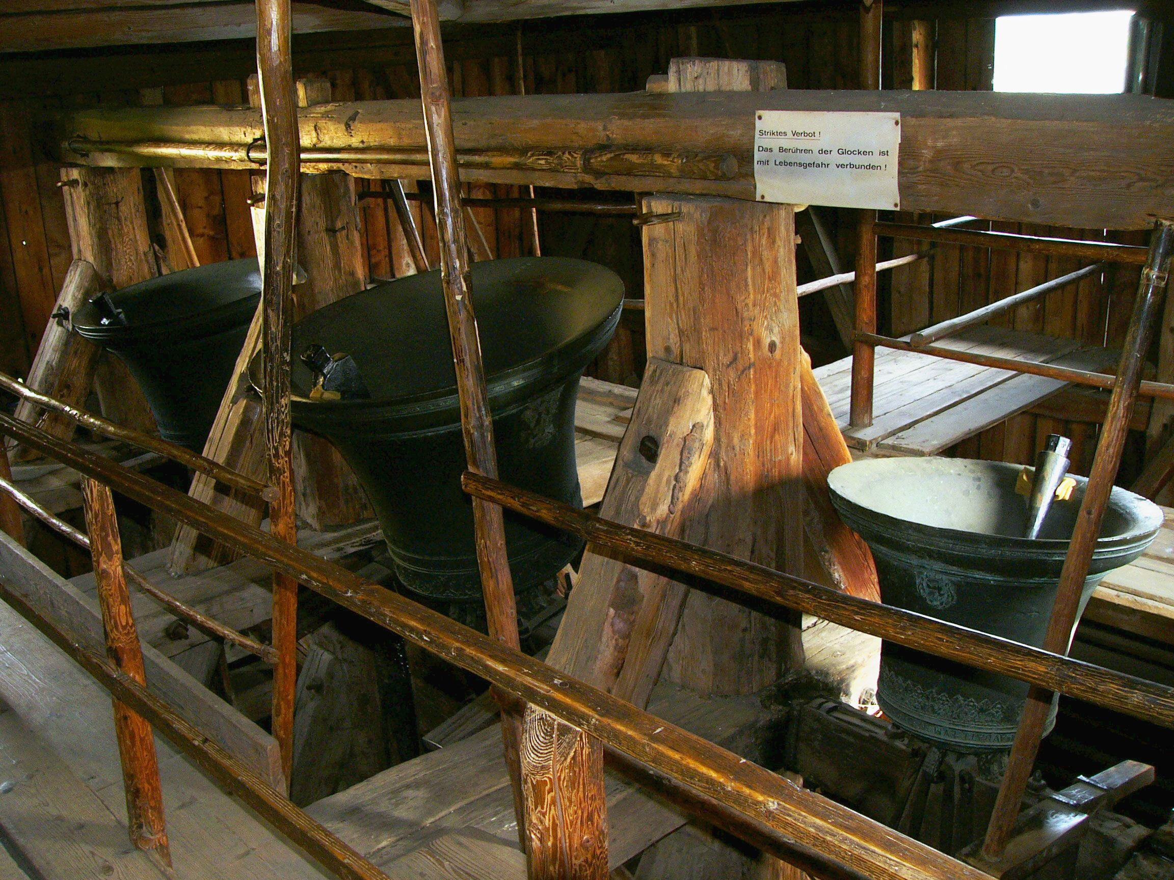 Rovensko pod Troskami, interiér dřevené zvonice kostela sv. Václava s obrácenými zvony